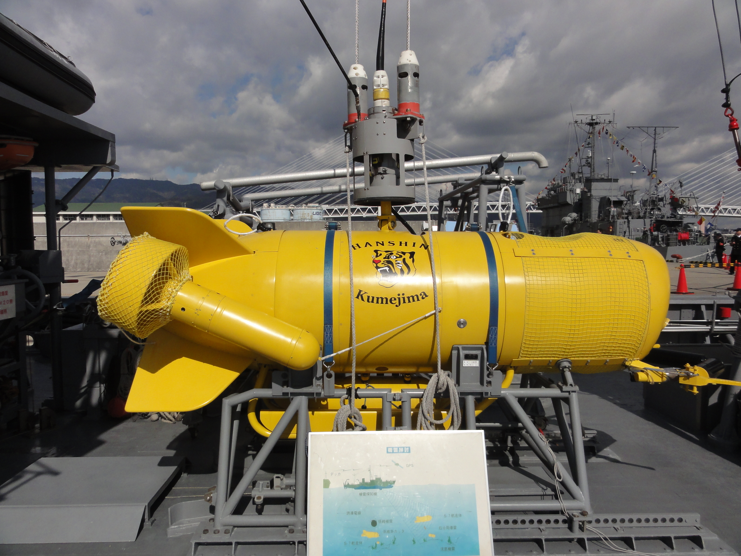 掃海艇くめじま（MSC-676）搭載の機雷処分具S-7 12年2月11日 海上自衛隊阪神基地にて